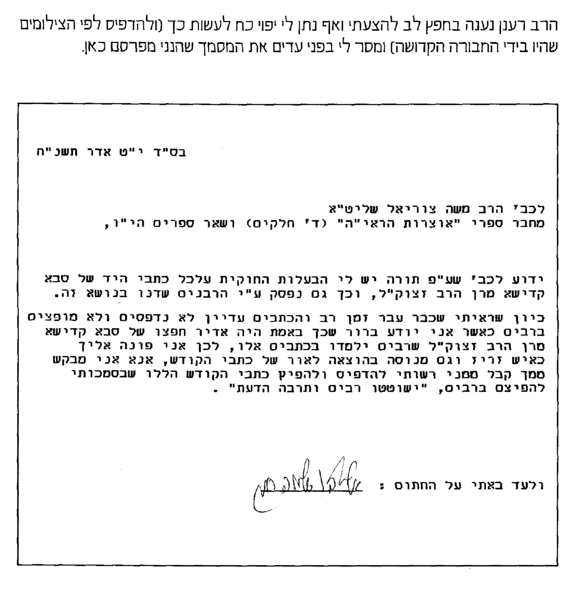 הרשאת הרב אליהו שלמה רענן לרב צוריאל, המתירה לו להדפיס את כתבי הראי"ה לאור (נדפס בספר אוצרות הראי"ה, כרך ד, ראשון לציון תשס"ב, עמ' 5)